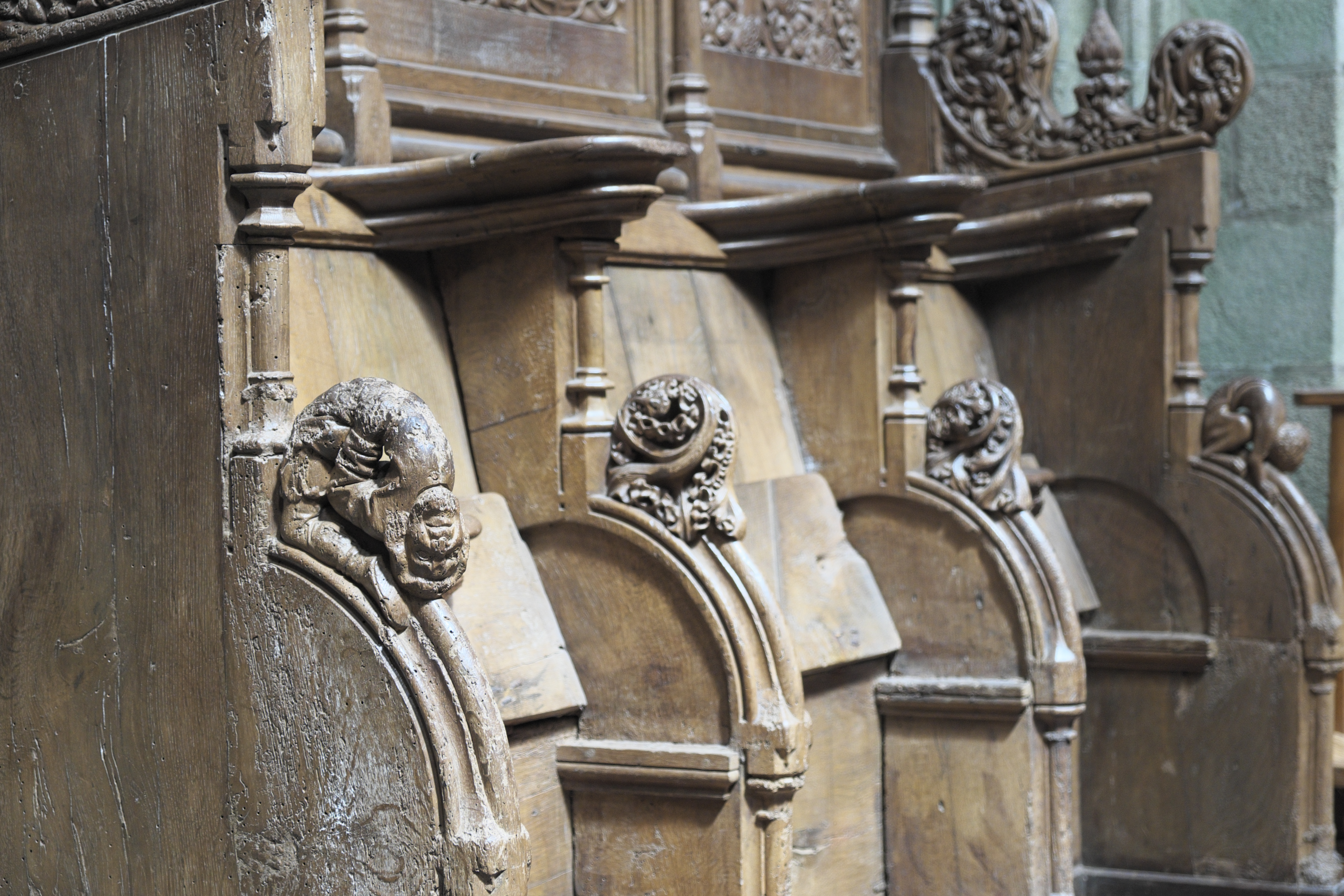 Ehemalige Kathedrale Saint-Paul-Aurélien in Saint-Pol-de-Léon im Département Finistère (Region Bretagne/Frankreich), Chorgestühl